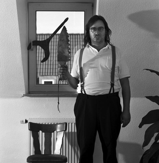 Wolfgang Ramadan. Fotografiert am 8.11.1998 in seiner Mietwohnung in München-Milbertshofen. Ramadan spielte von 1998-2001 den populären Mieter Wolfgang für die Süddeutsche Zeitung. Erschienen in: Süddeutsche Zeitung Nr. 262 am 13. November 1998. Kolumnentext: Unser Mieter Wolfgang sollte sein schweres Handwerkszeug lieber wieder in der Gerätekiste verschwinden lassen. Dass in seinem Mietvertrag Schönheitsreparaturen vereinbart wurden, besagt lediglich, dass er fällige Maler- und Tapezierarbeiten in bestimmten Intervallen vornehmen muss. Und bevor er damit anfängt, sollte er seine Brille putzen und den Mietvertrag endlich einmal mit Verstand durchlesen. Nicht alle Klauseln, die ihm sein Vermieter da hineinschrieb, sind nämlich gültig. Sie sind es auch dann nicht, wenn er blindlings den Vertag unterschrieben hat, was er ohnehin hätte tunlichst vermeiden sollen. Im Zweifelsfall ist ein vorsorglicher Gang zu einer örtlichen Mieterberatung empfehlenswert, denn: Fragen kostet nichts, Irrtümer sind teuer.